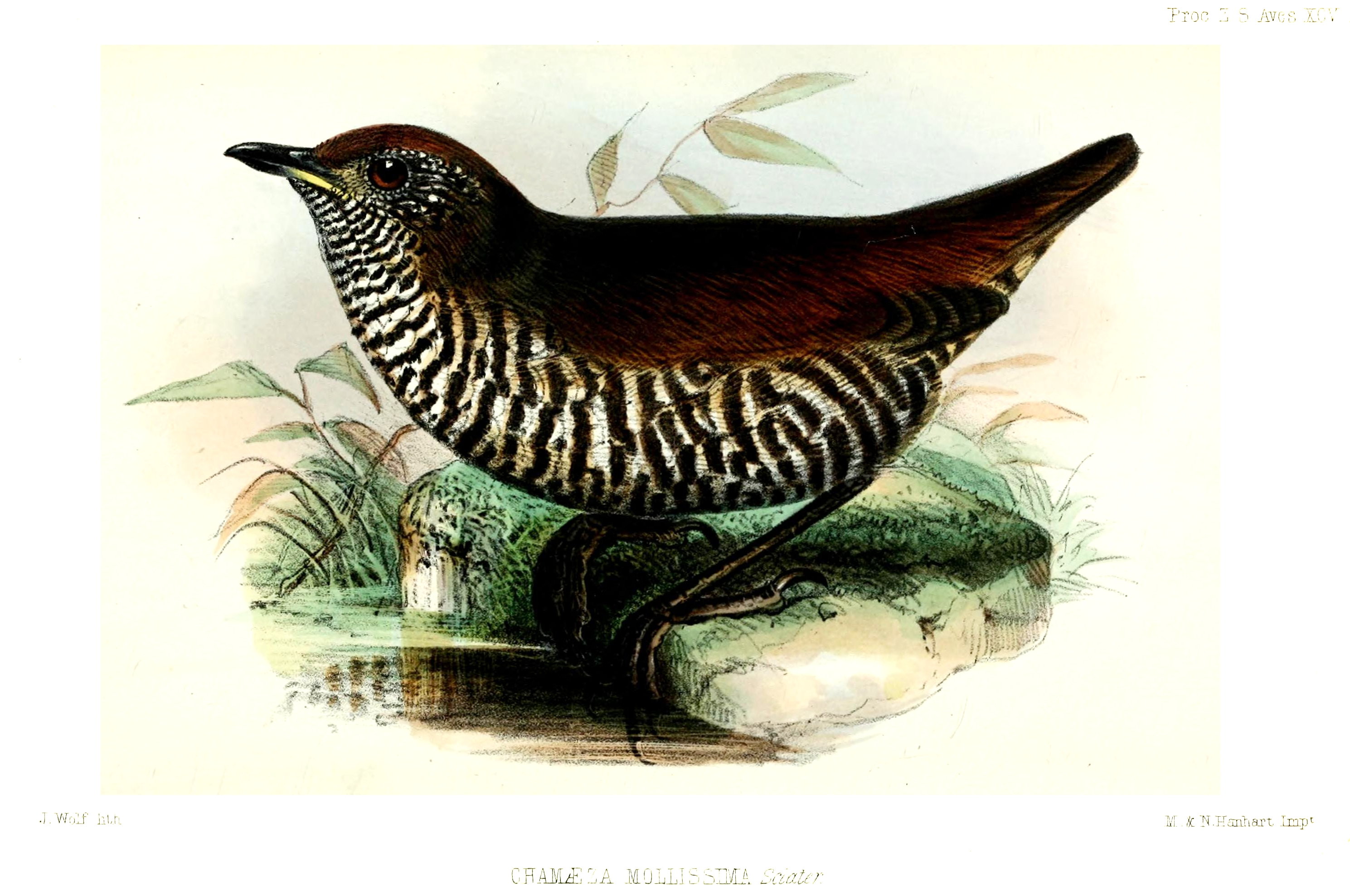 Chamaeza mollissima